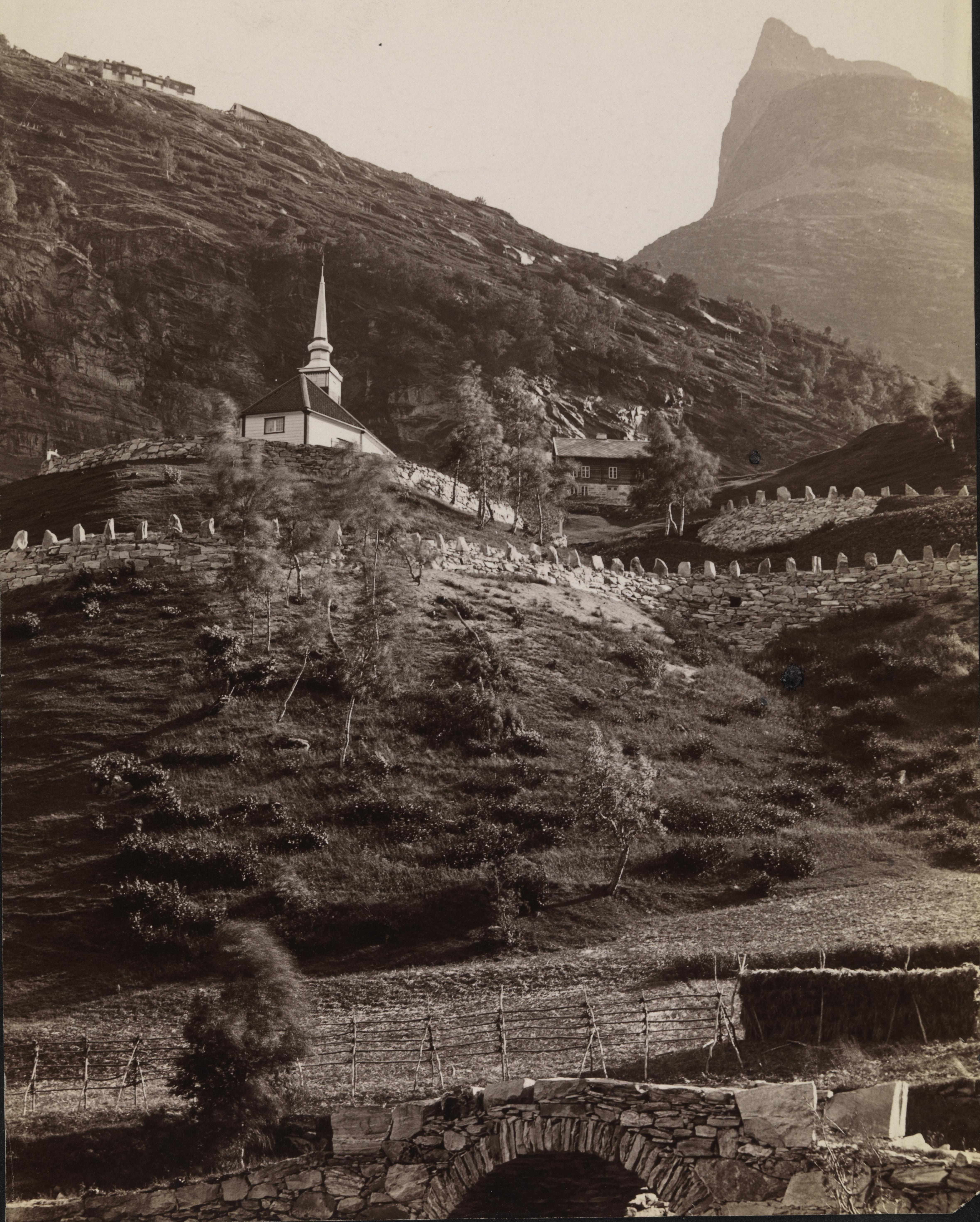 Bildet er hentet fra Nasjonalbibliotekets bildesamling Stranda, Møre og Romsdal